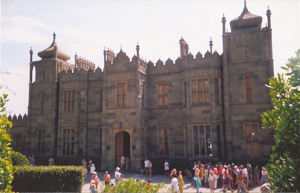 Северный фасад Воронцовского дворца